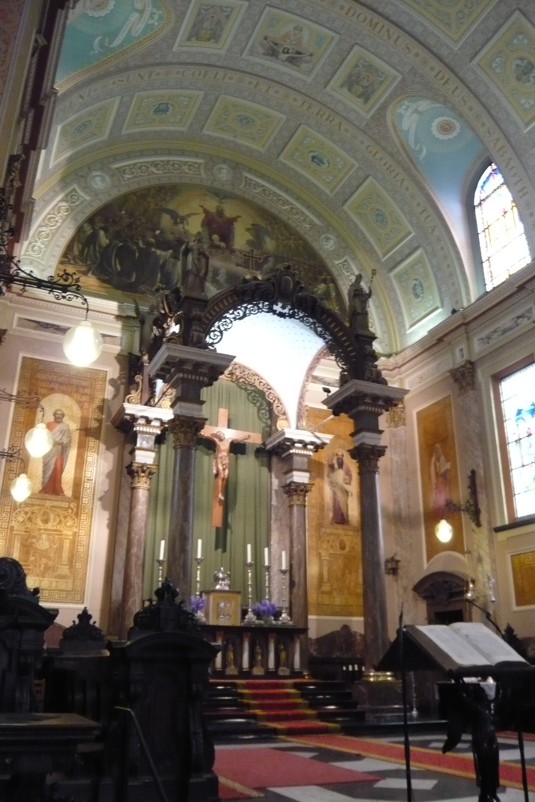 Sint-Josephkerk, Haarlem